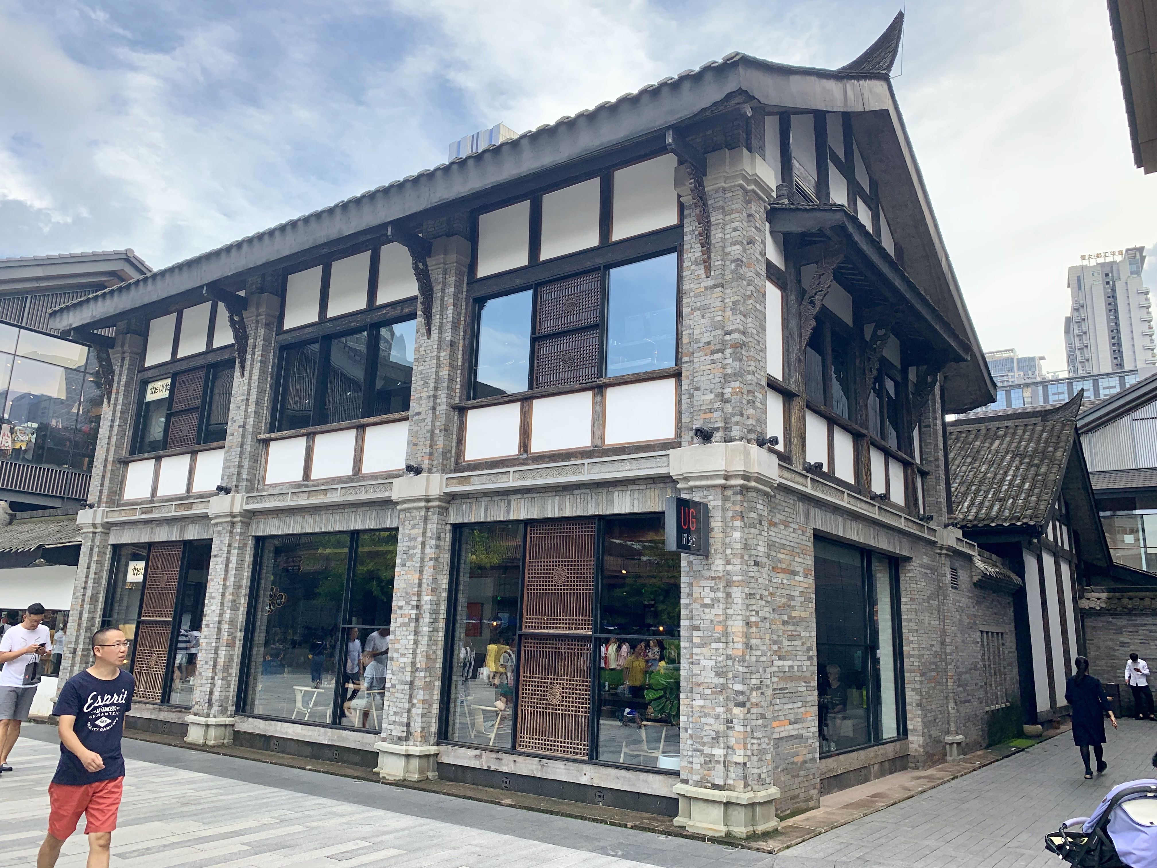 成都太古里内高宅